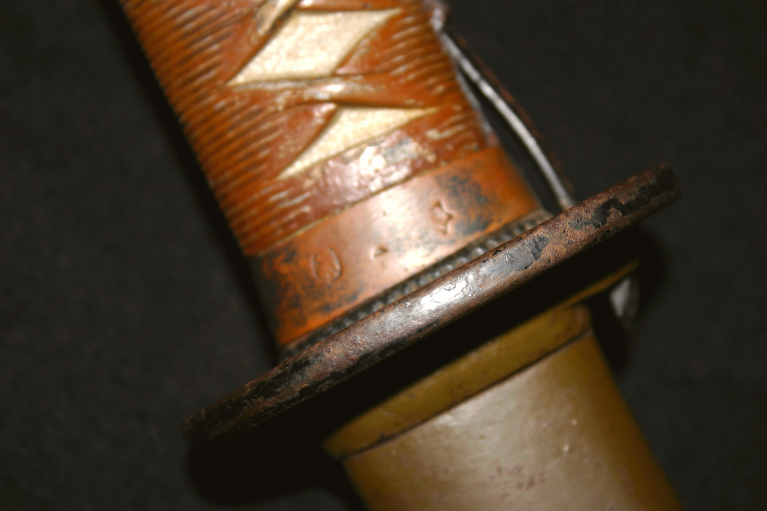 九五式軍刀の駐爪（ちゅうそう）部分。当初は棟側に駐爪はあったが、中期型末期から横（鎬側）になる。